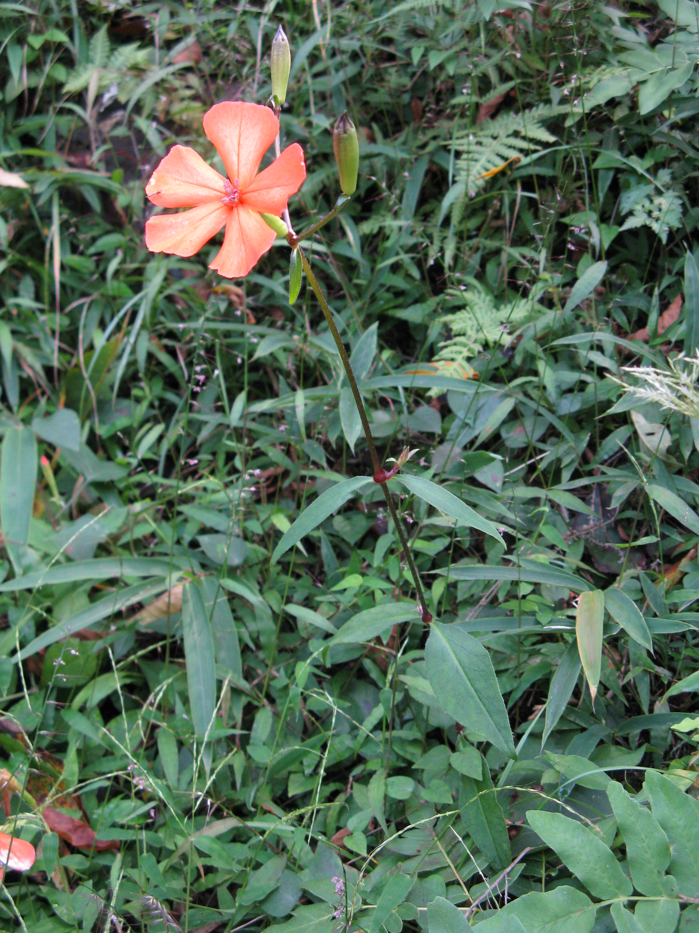 Scientific name Lychnis miqueliana